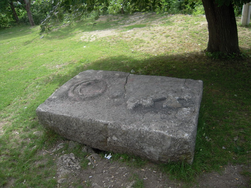 Kameni_blok_kod_manastira (Krupa na Vrbasu)